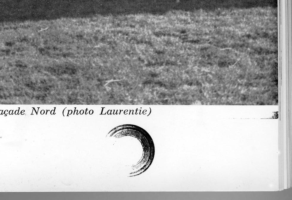 Maculature (ou maculage) sur la marge d'un livre imprimé en typographie : trace d'un coin de serrage d'un châssis typographique.